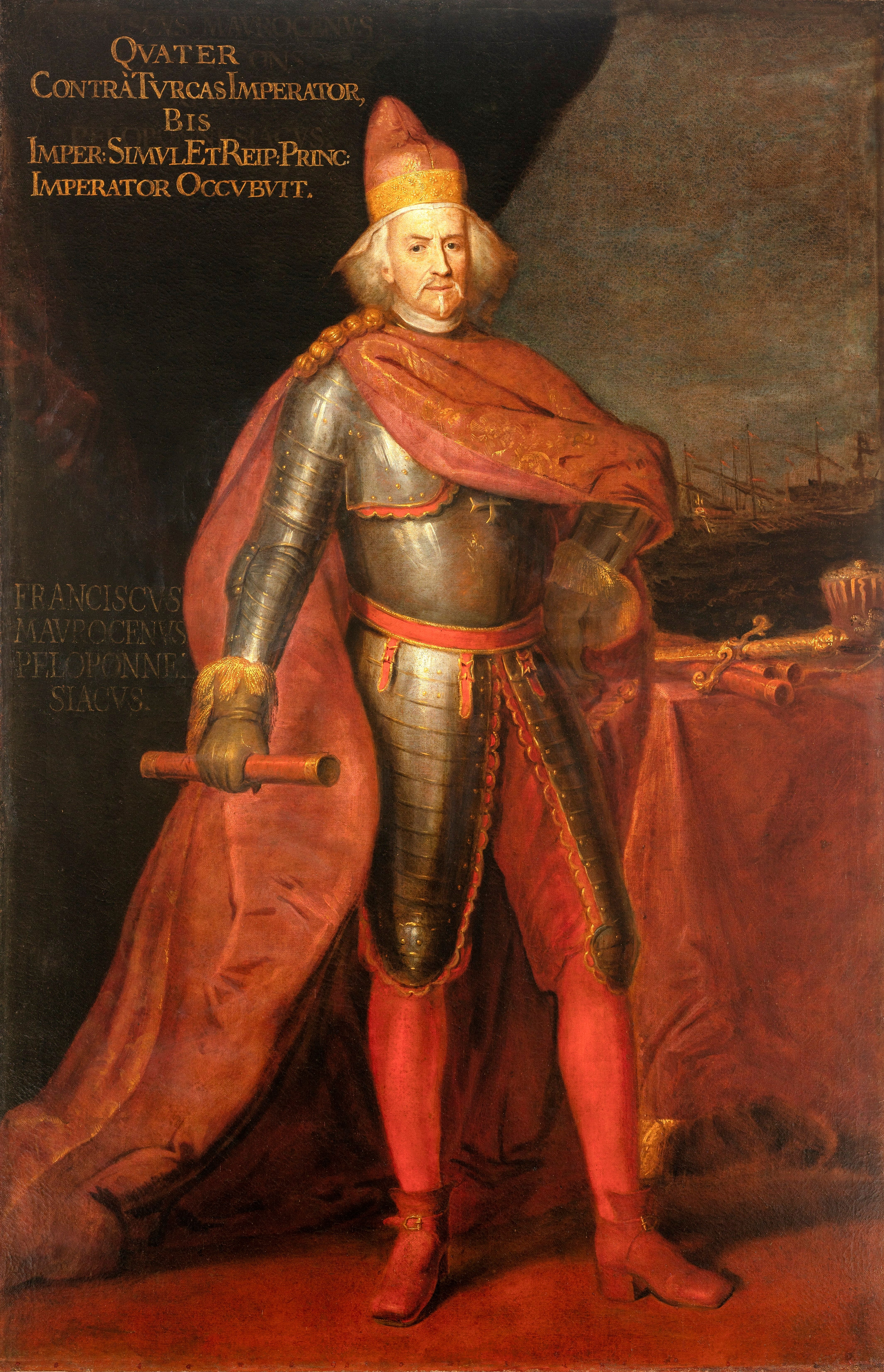 Portrait of Francesco Morosini, doge di Venezia.